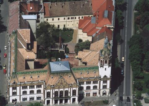 Kiskunfélegyháza Town Hall, Hungary, aerial photography